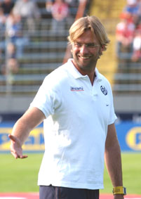 Jürgen Klopp, damals Trainer von Mainz 05 This tag does not indicate the copyright status of the attached work. A normal copyright tag is still required. See Commons:Licensing for more information. Personality rights warning This work depicts one or more identifiable persons. The use of depictions of living or deceased persons may be restricted by laws regarding personality rights. The extent of these restrictions depends on jurisdiction. Personality rights restrictions apply independently of copyright. Before using this content, please ensure that the intended use does not infringe any personality rights under applicable laws. You are solely responsible for ensuring that you do not infringe someone else's personality rights. See our general disclaimer.